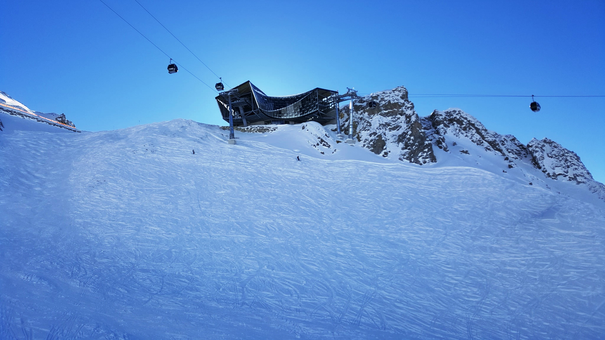 Die Mittelstation der Trittkpopfbahn und Flexenbahn am Ochsenboden